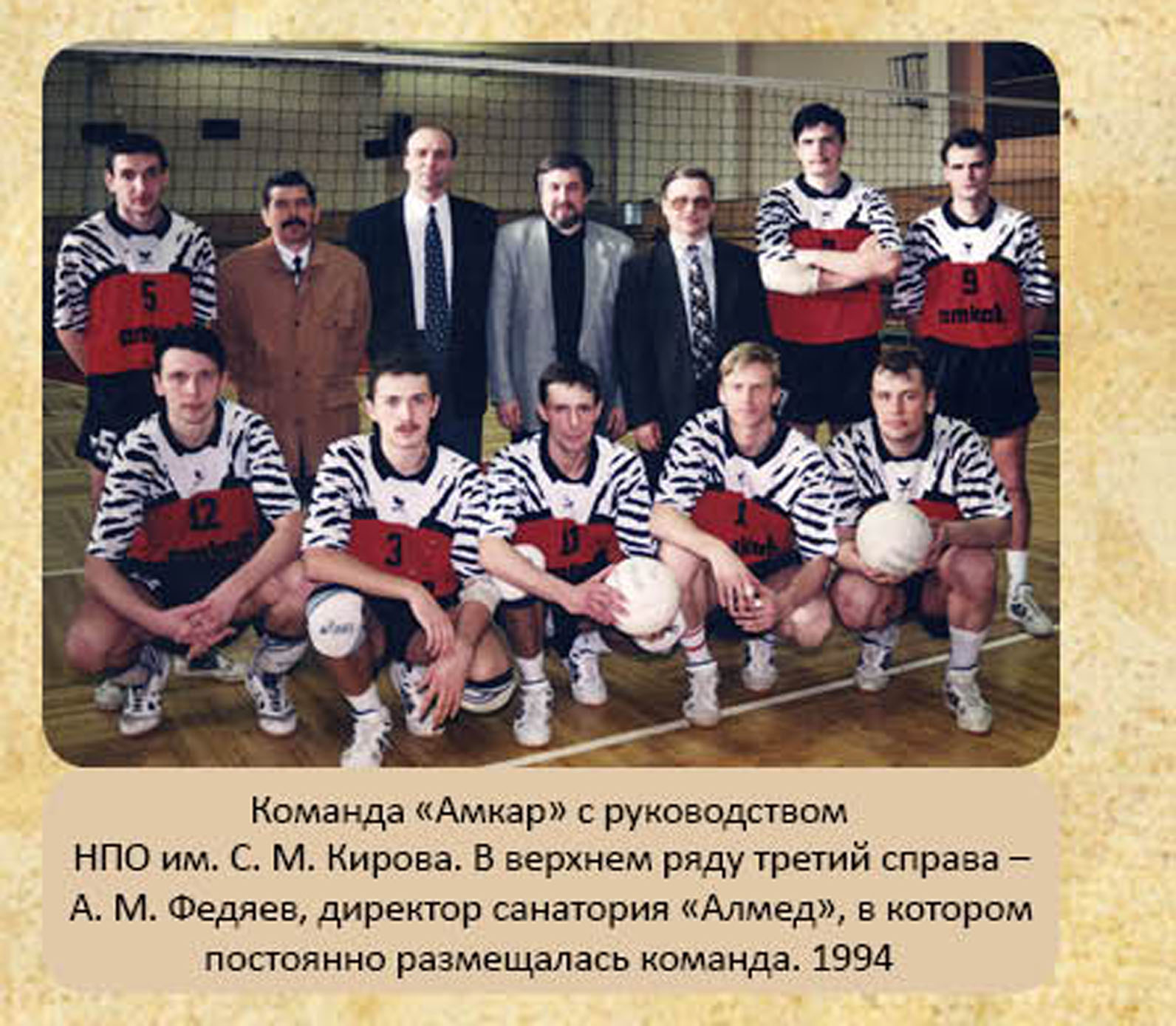 Руководство команды среди игроков